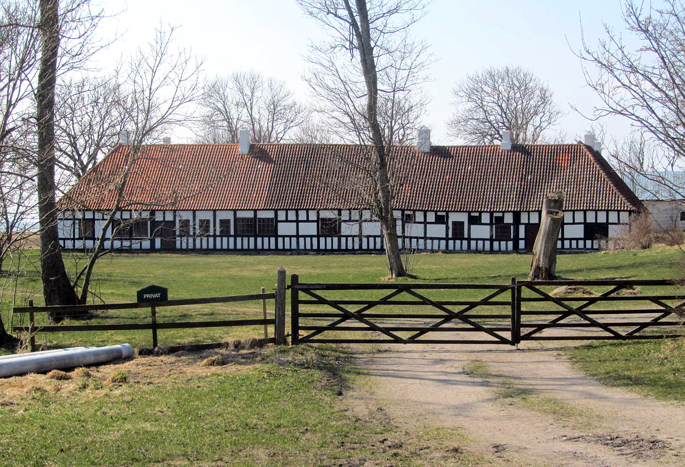 Aggersborggaard set fra øst